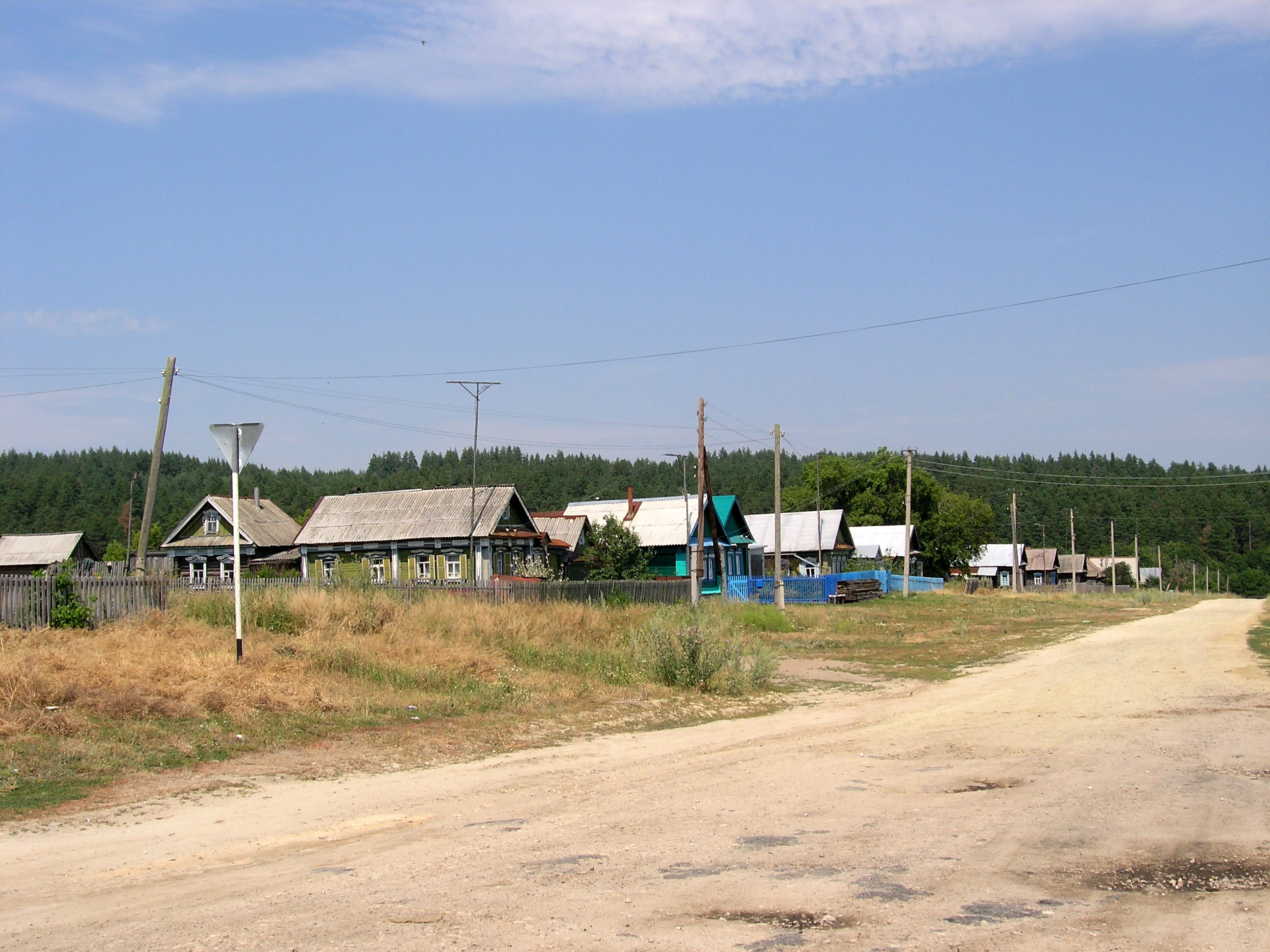 Улица Советская, село Смолькино, Сызранский район Самарской области, Россия